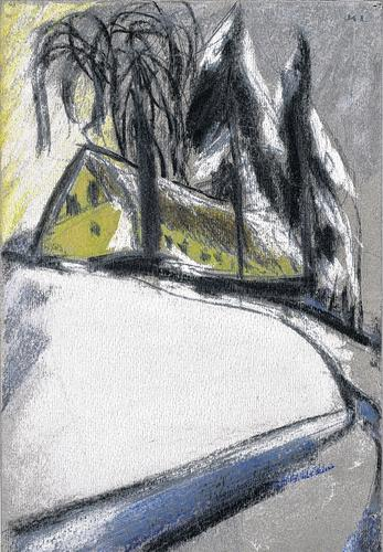 Haus in winterlicher Landschaft